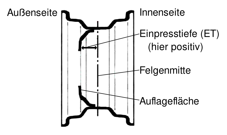 Einpresstiefe description